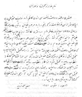 دستخط احمد کسروی